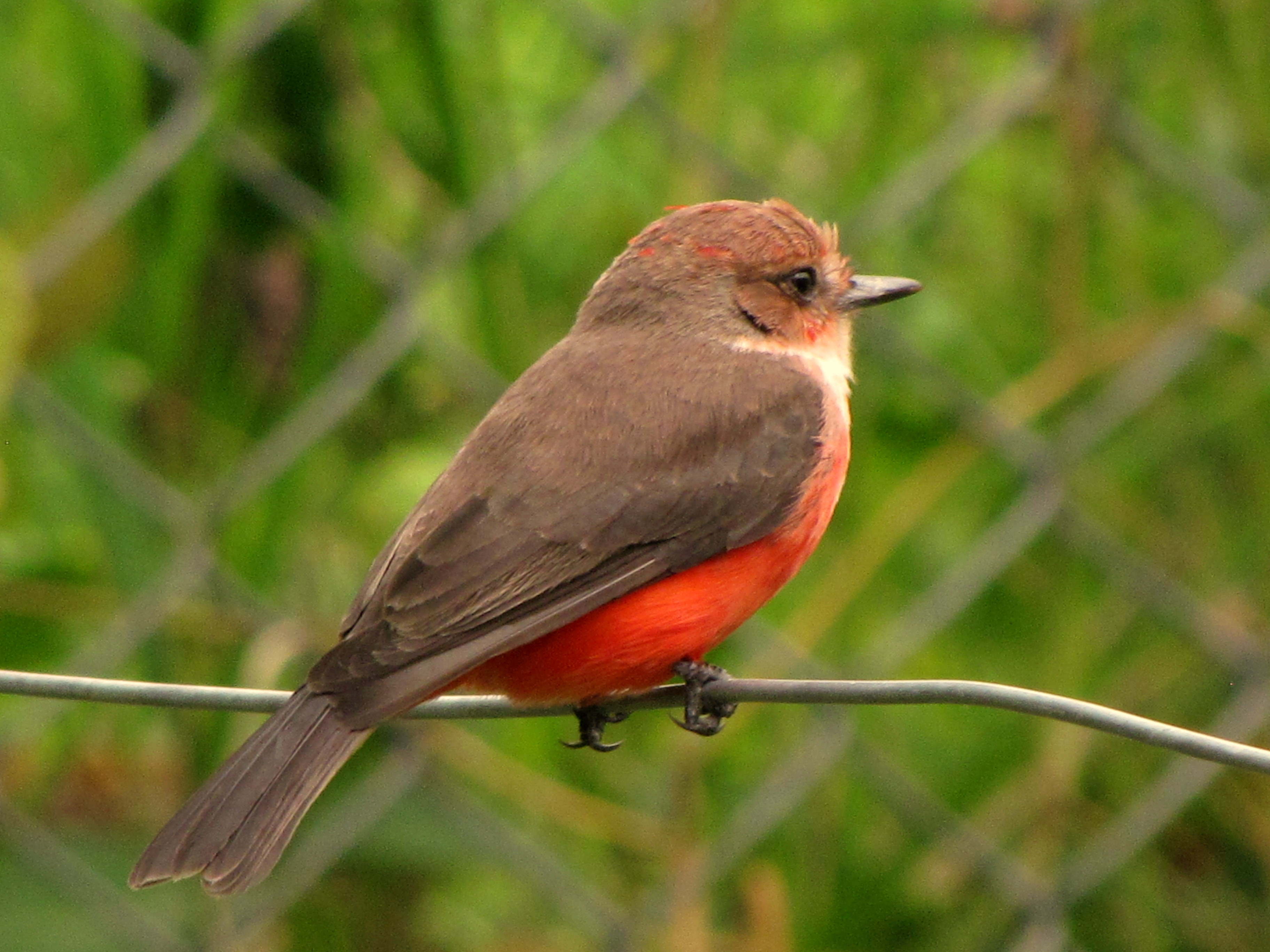 Pyrocephalus rubinus (Pechirrojo, Petirrojo, Cardenal) - Macho juvenil